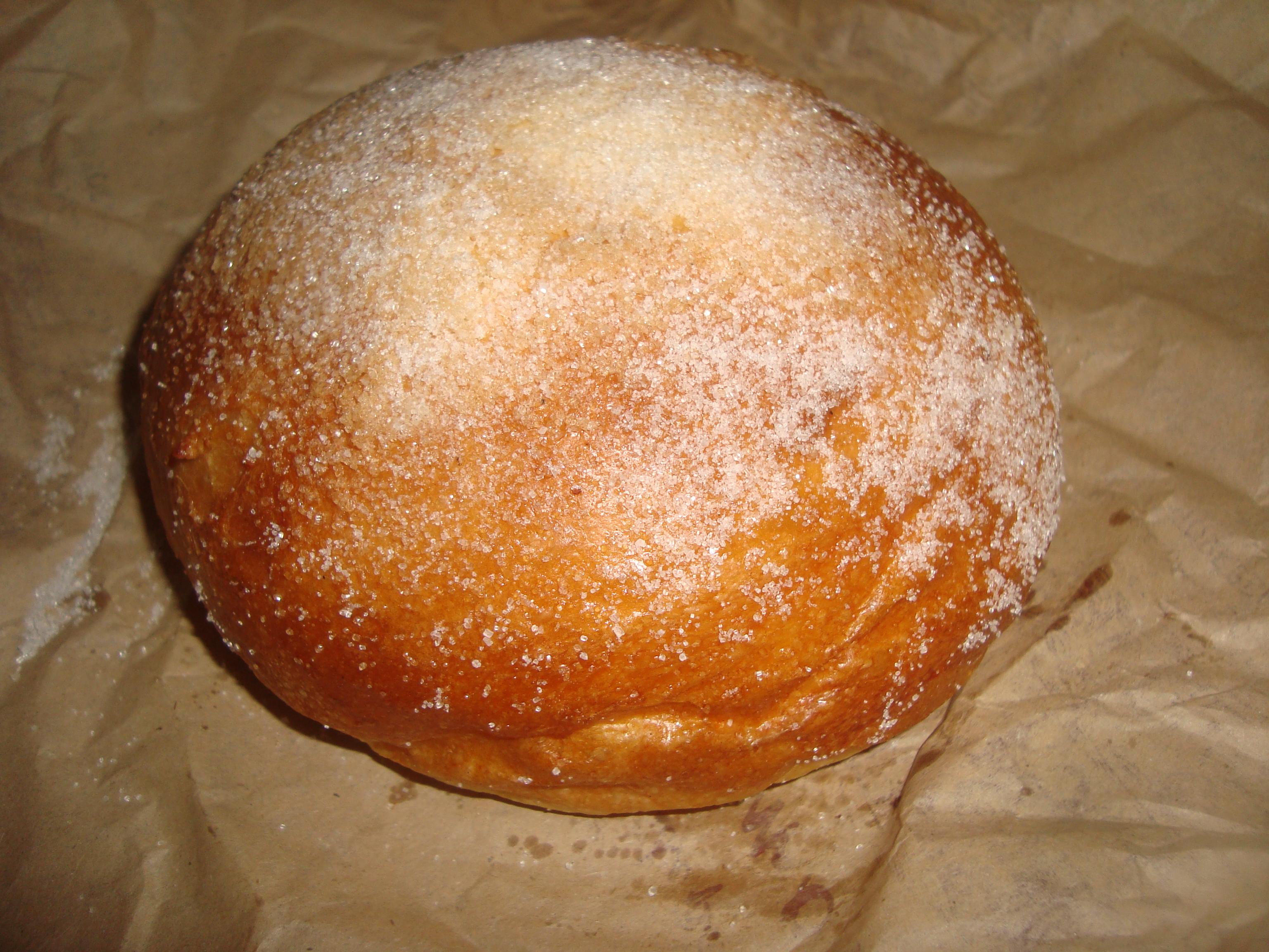 El "Panquemado", tradicional dolç valencià.